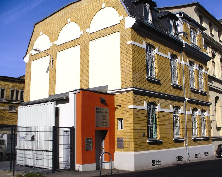 Vorderansicht der Gedenkstätte Amthordurchgang Gera